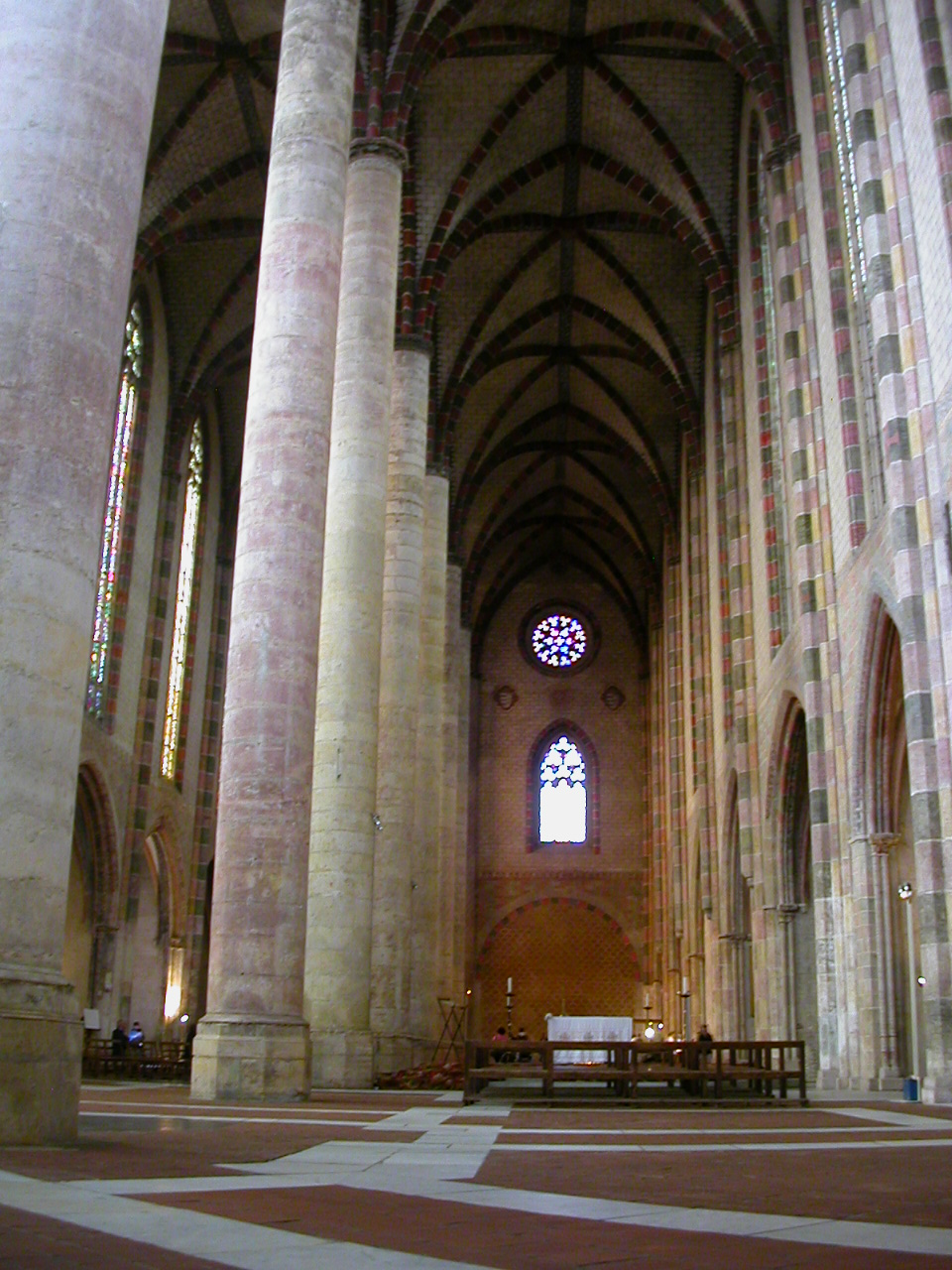 La Nef de l'ensemble conventuel des Jacobins, Toulouse, Région Midi-Pyrenées / Province du Languedoc, France